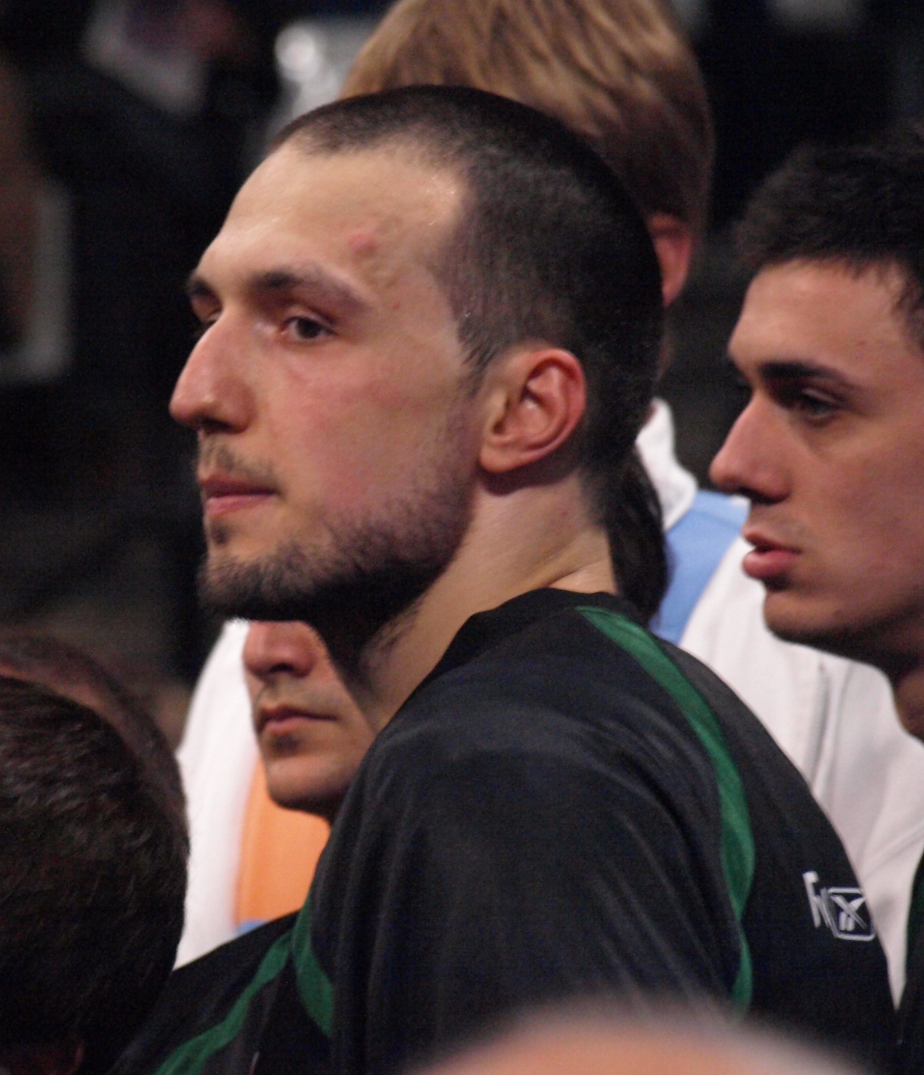 Luka Bogdanovic en el Olímpico de Badalona.